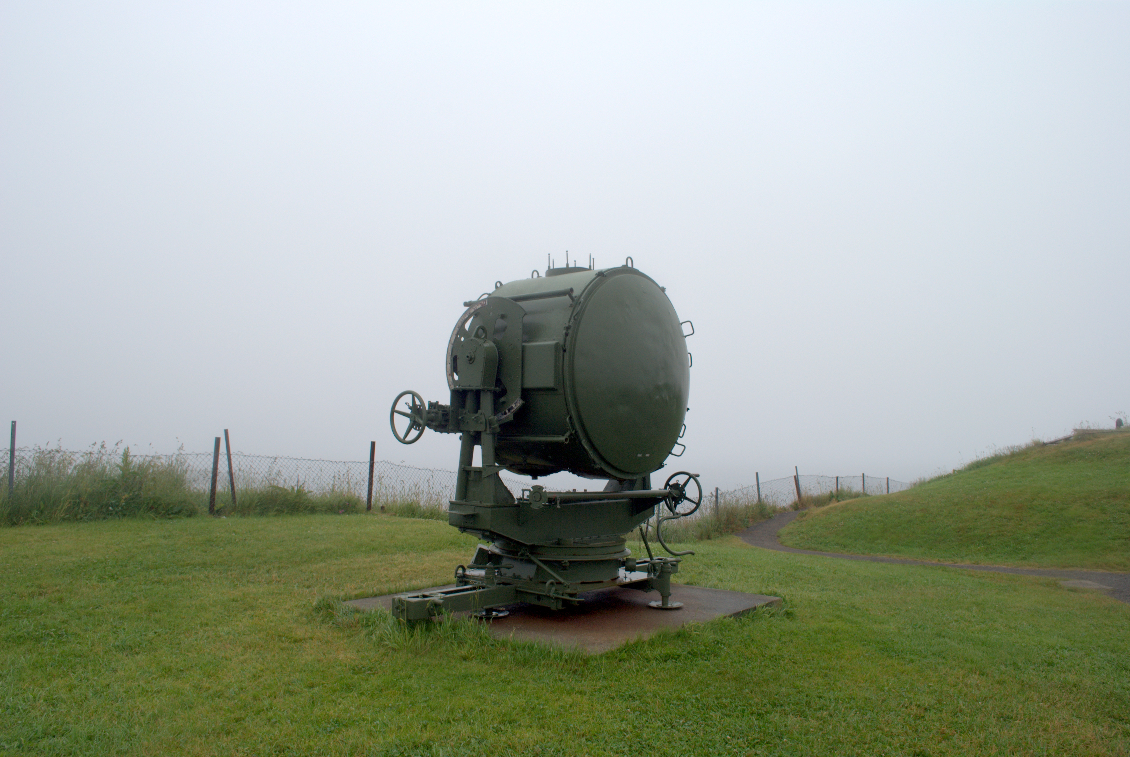 Detaljer fra Ergan kystfort ved Bud i Møre og Romsdal - 150 cm lyskaster